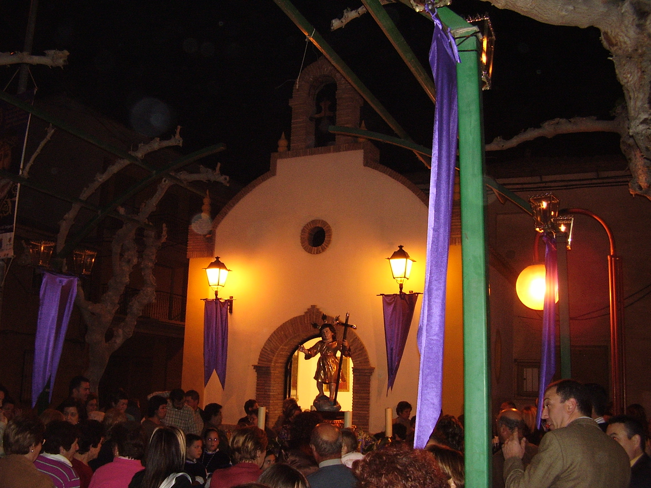 Está datada en fines del siglo XIX e inicios del XX. Las Torres de Cotillas.